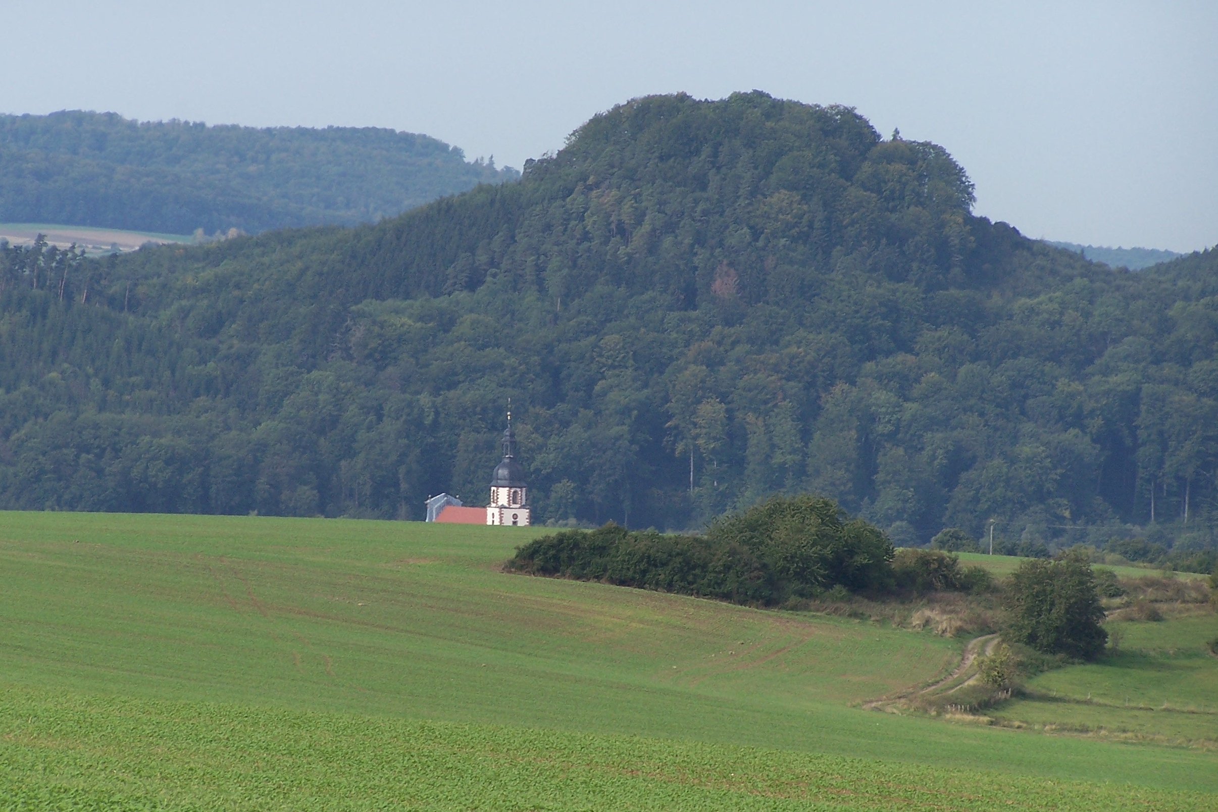 Blick von Osten auf den Bocksberg und die Kirche von Schleid im Ulstertal.